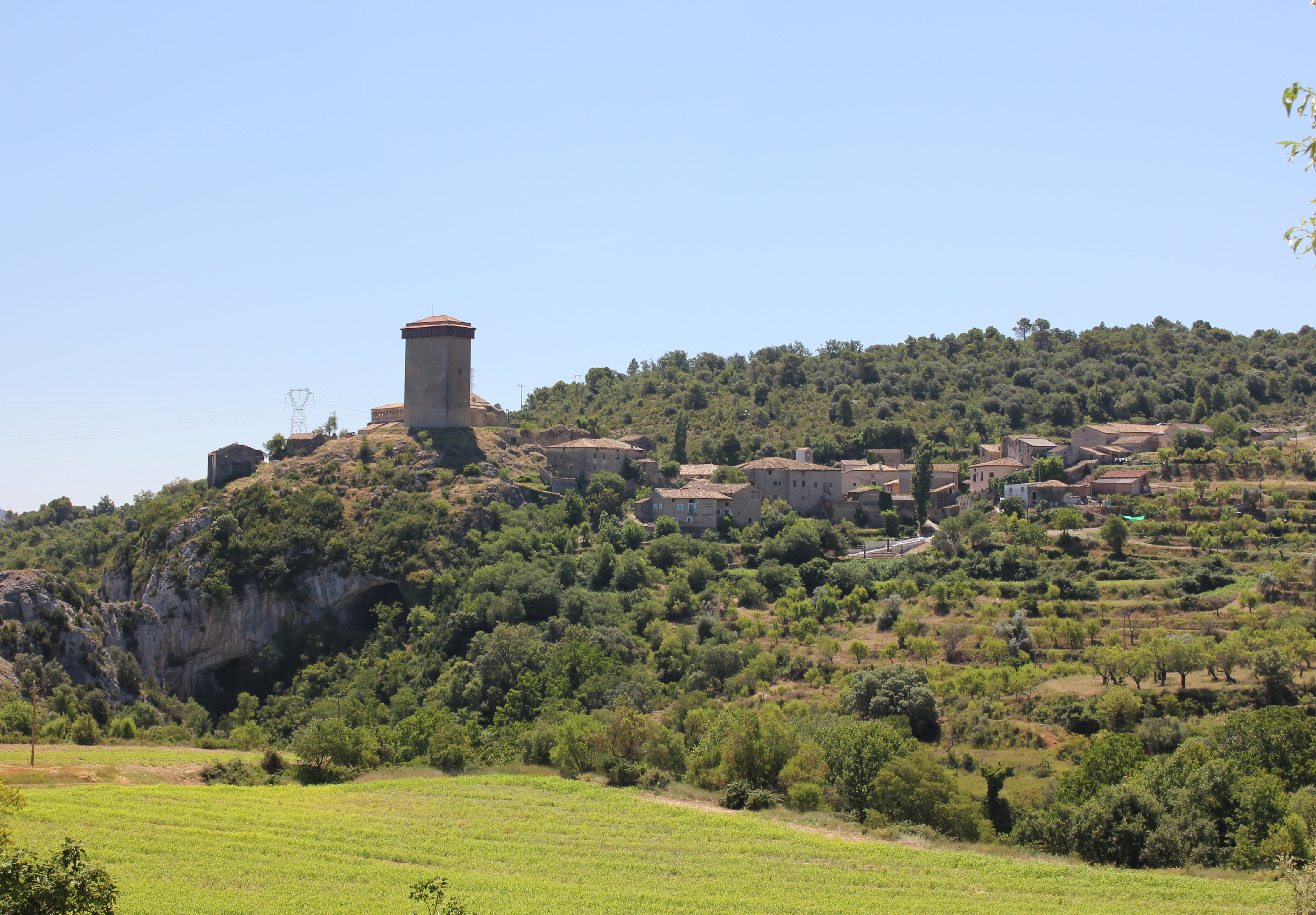 Aragonés: l'Abizanda